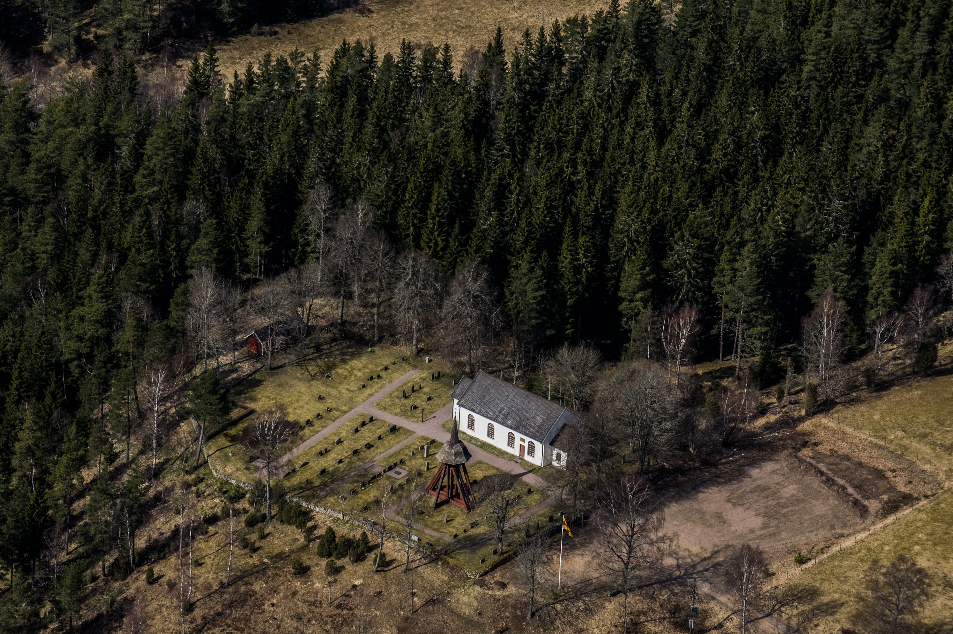 Utvängstorps kyrka